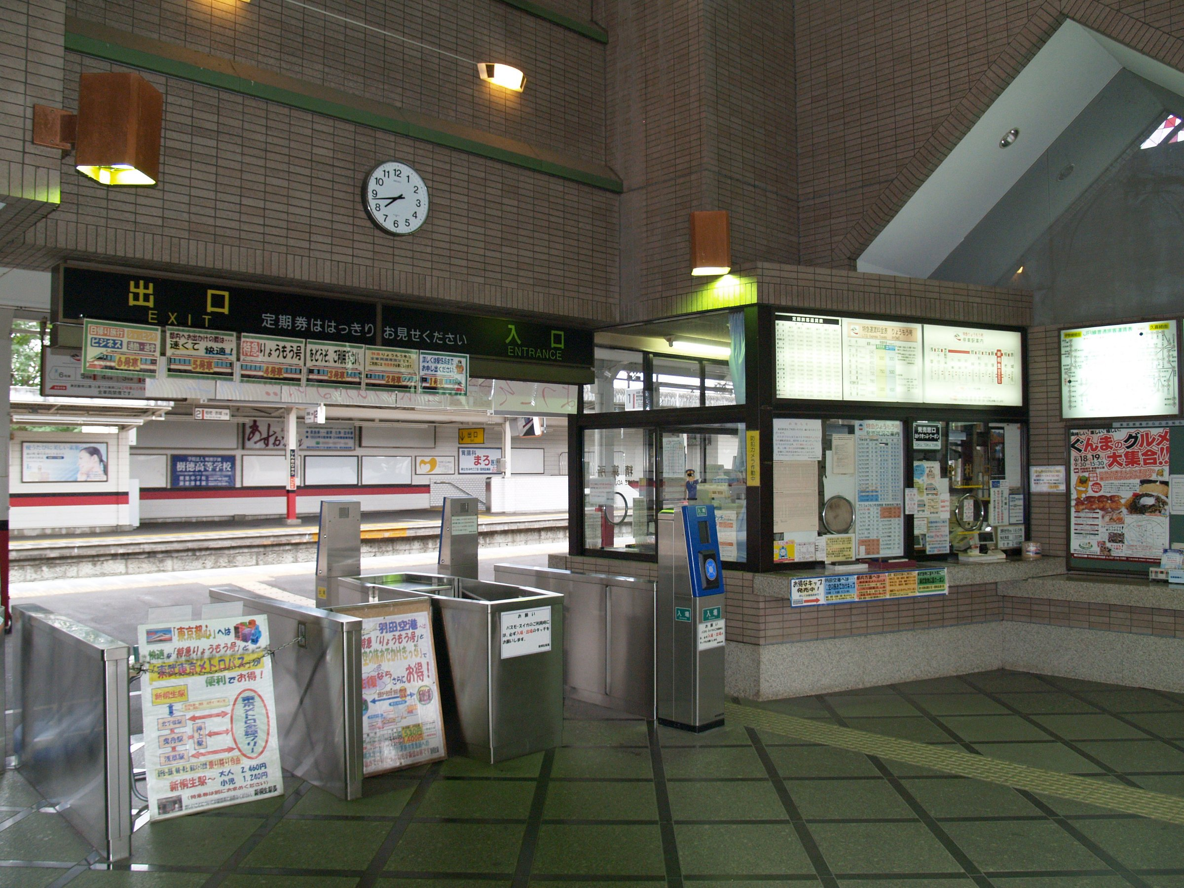 新桐生駅改札口